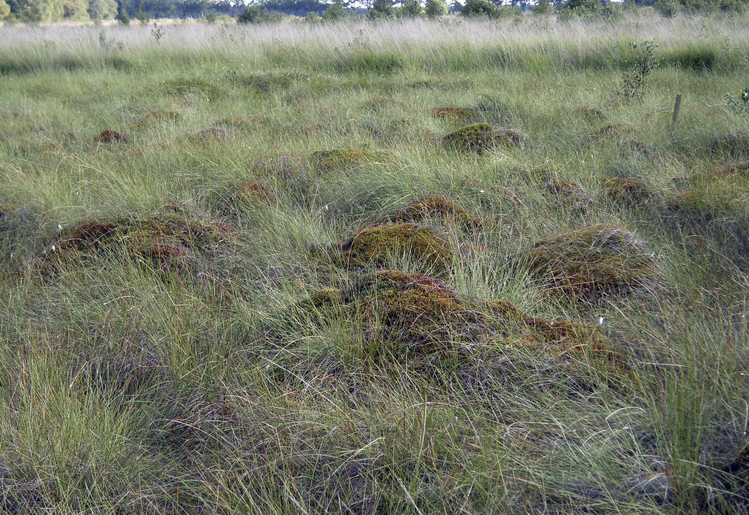 Bult-Schlenken-Komplex in einem regerierenden Regenmoor in Nordwestdeutschland